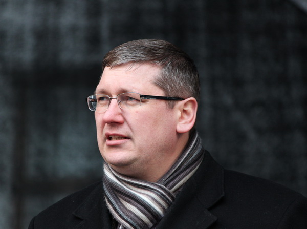 Mindaugas Kuklierius, 2011 m. Kauno Kaziuko mugėje.